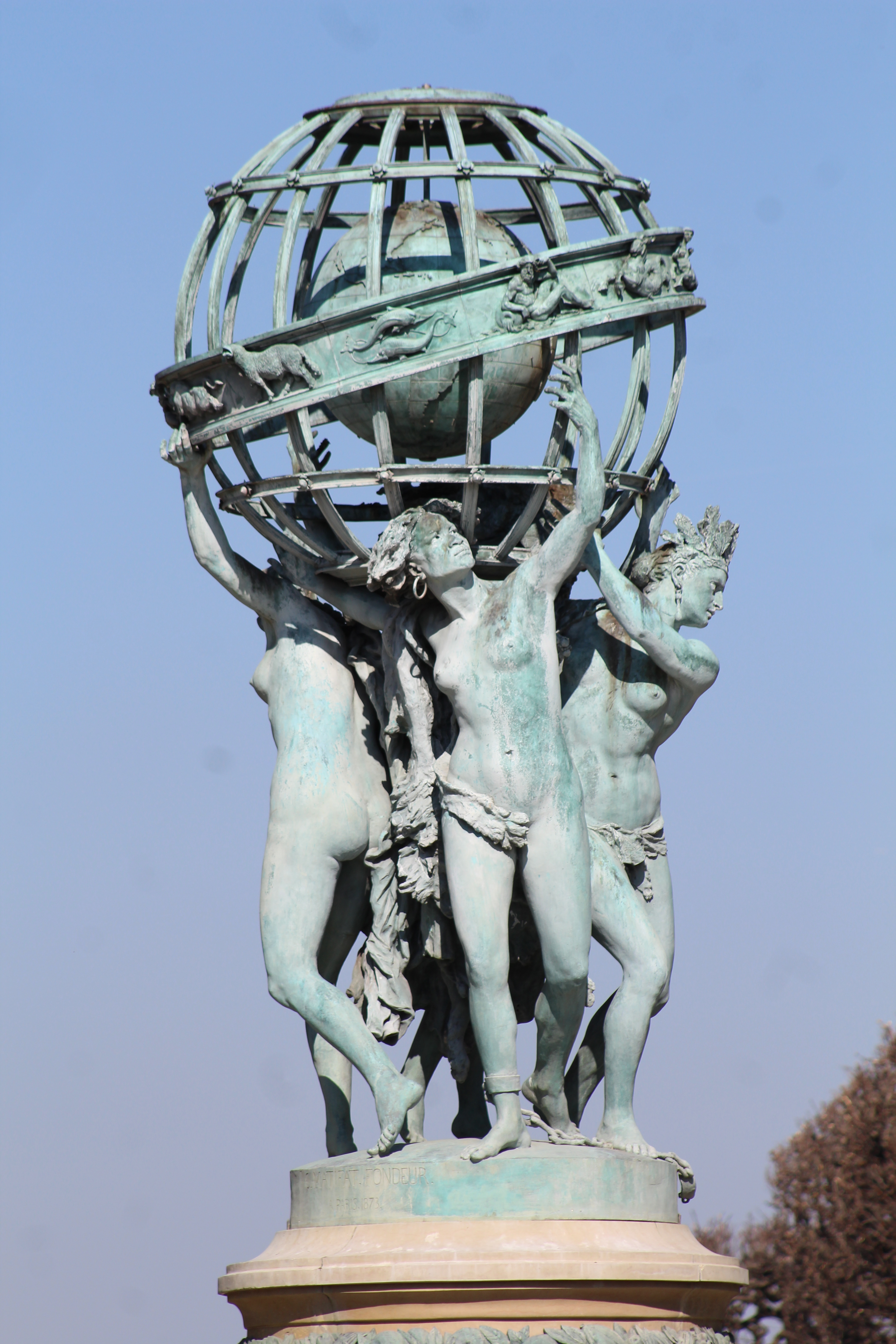 Fontaine des Quatre Parties du Monde, dans le jardin des Grands-Explorateurs Marco-Polo et Cavelier-de-la-Salle, Paris.